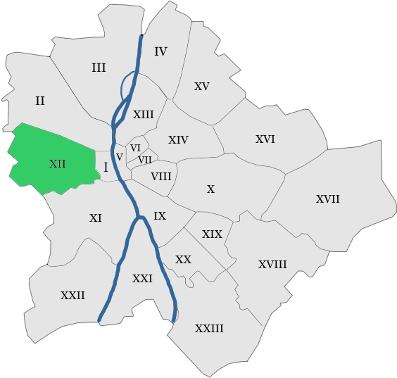 map hungary budapest district 12